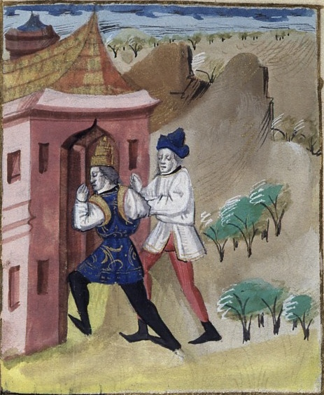 Robert Courteheuse emprisonné